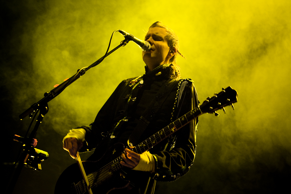 Sigur Rós No Campo Pequeno, 11 Novembro 2008.